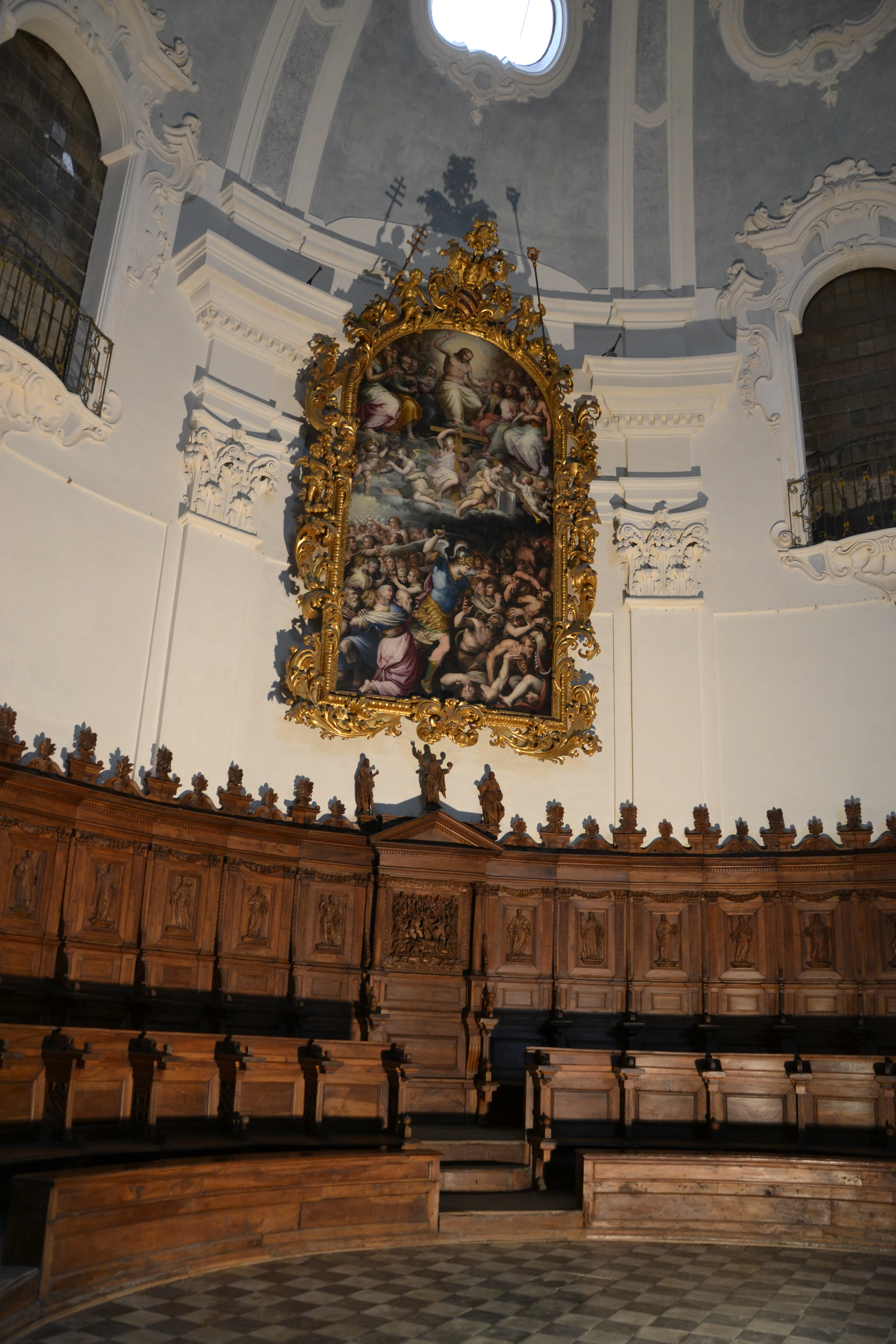 convento domenicano di Santa Croce a Bosco Marengo (AL) realizzato per volontà di papa Pio V nella seconda metà del sec. XVI, nel 1862 divenne riformatorio giovanile fino al 1989. Altare progettato da Giorgio Vasari nel 1569 a Firenze con pittori della sua bottega tra cui Francesco Morandini detto “Il Poppi”, Jacopo Zucchi e Giovanni Battista Naldini